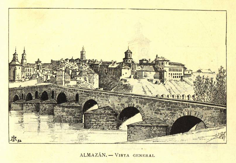 Almazán. Vista general.